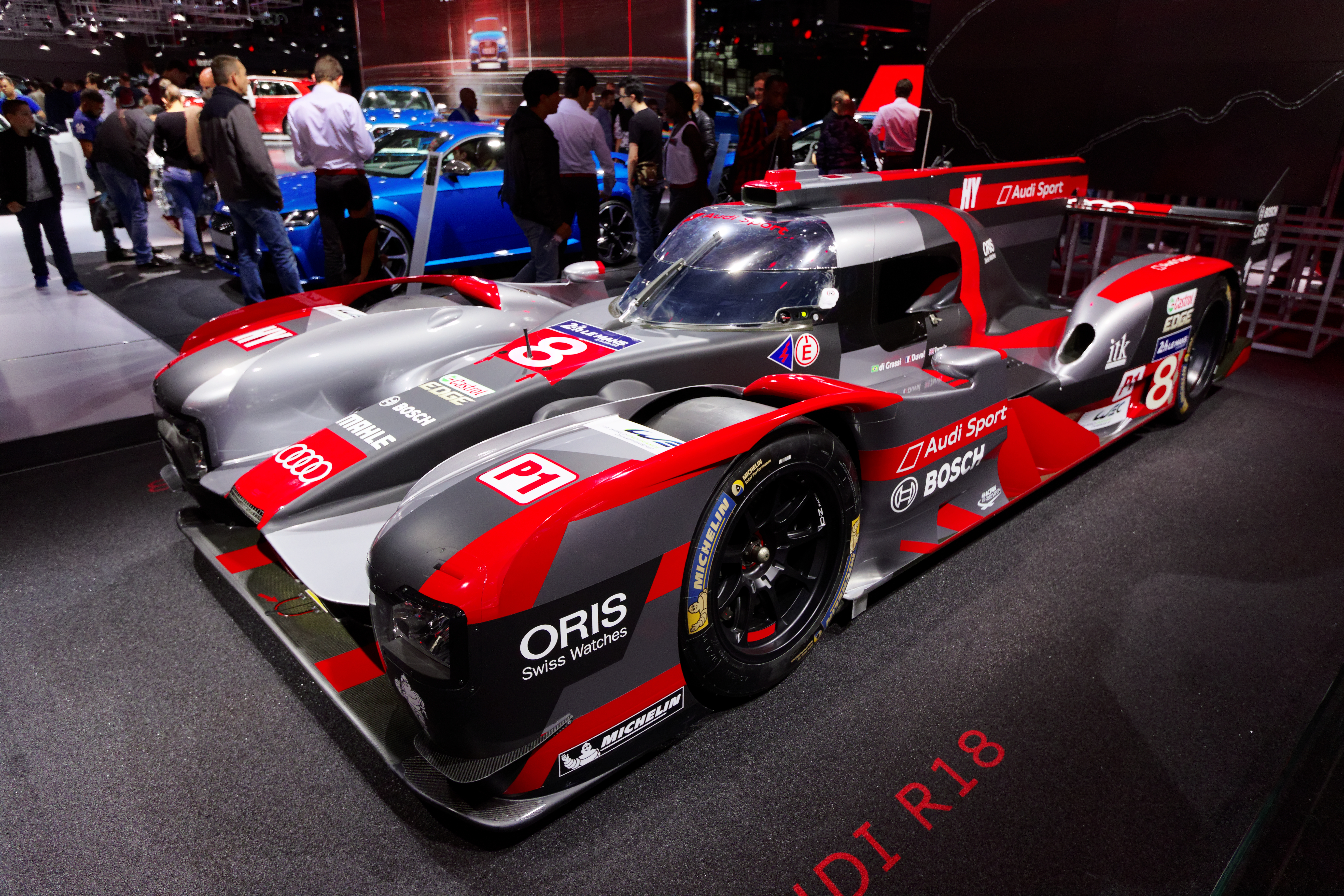 Une Audi R18 présentée lors du mondial de l'automobile de Paris 2016.